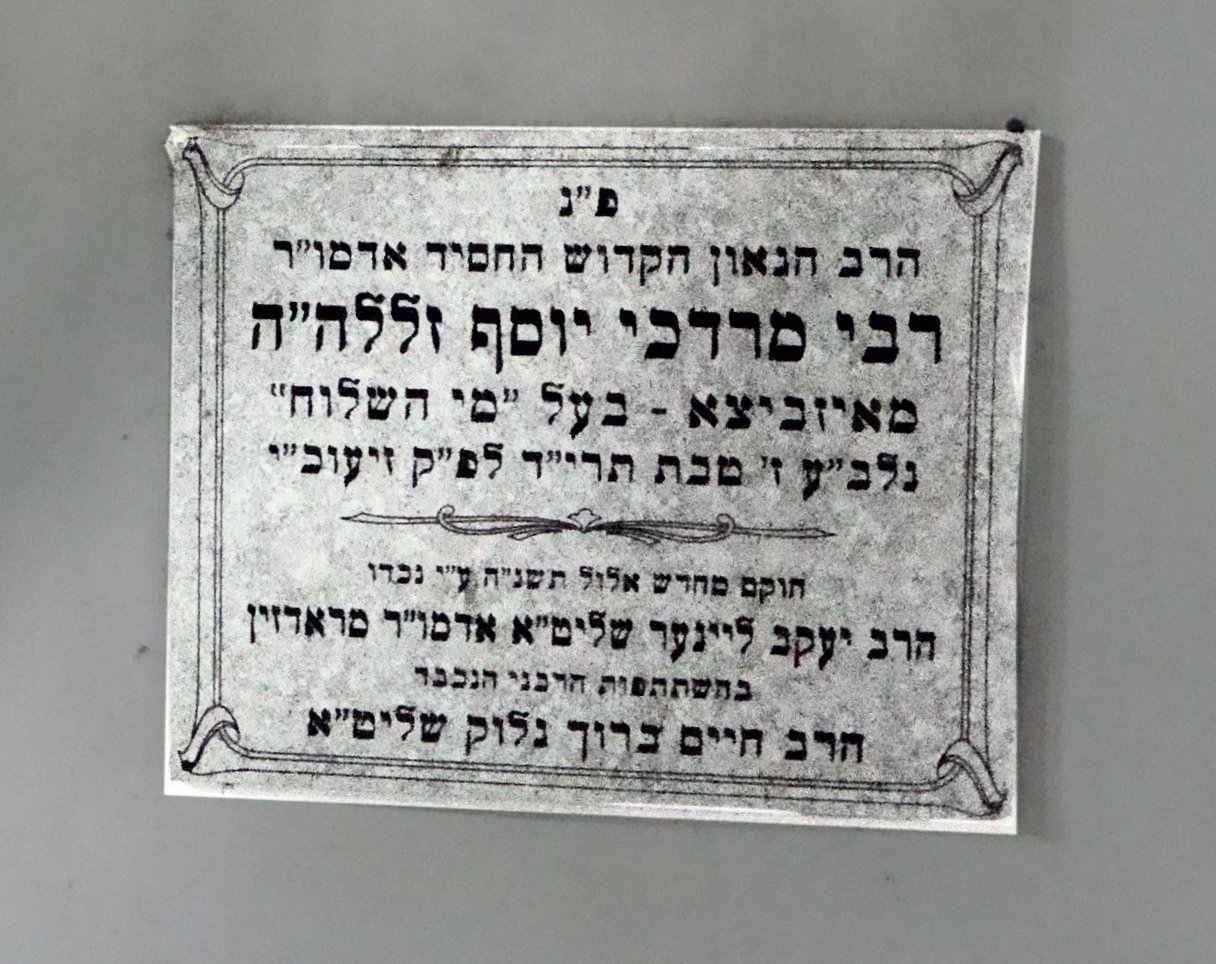 Kirkut w Izbicy